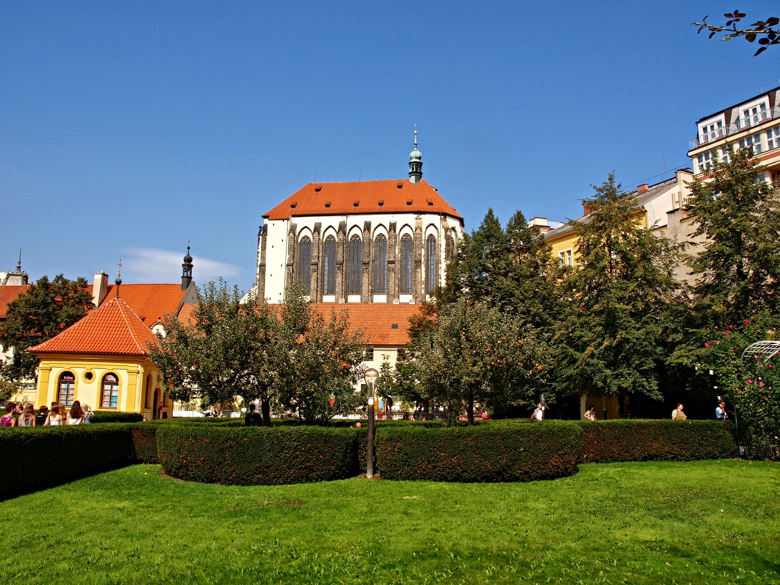 Kostel Panny Marie Sněžné, Praha